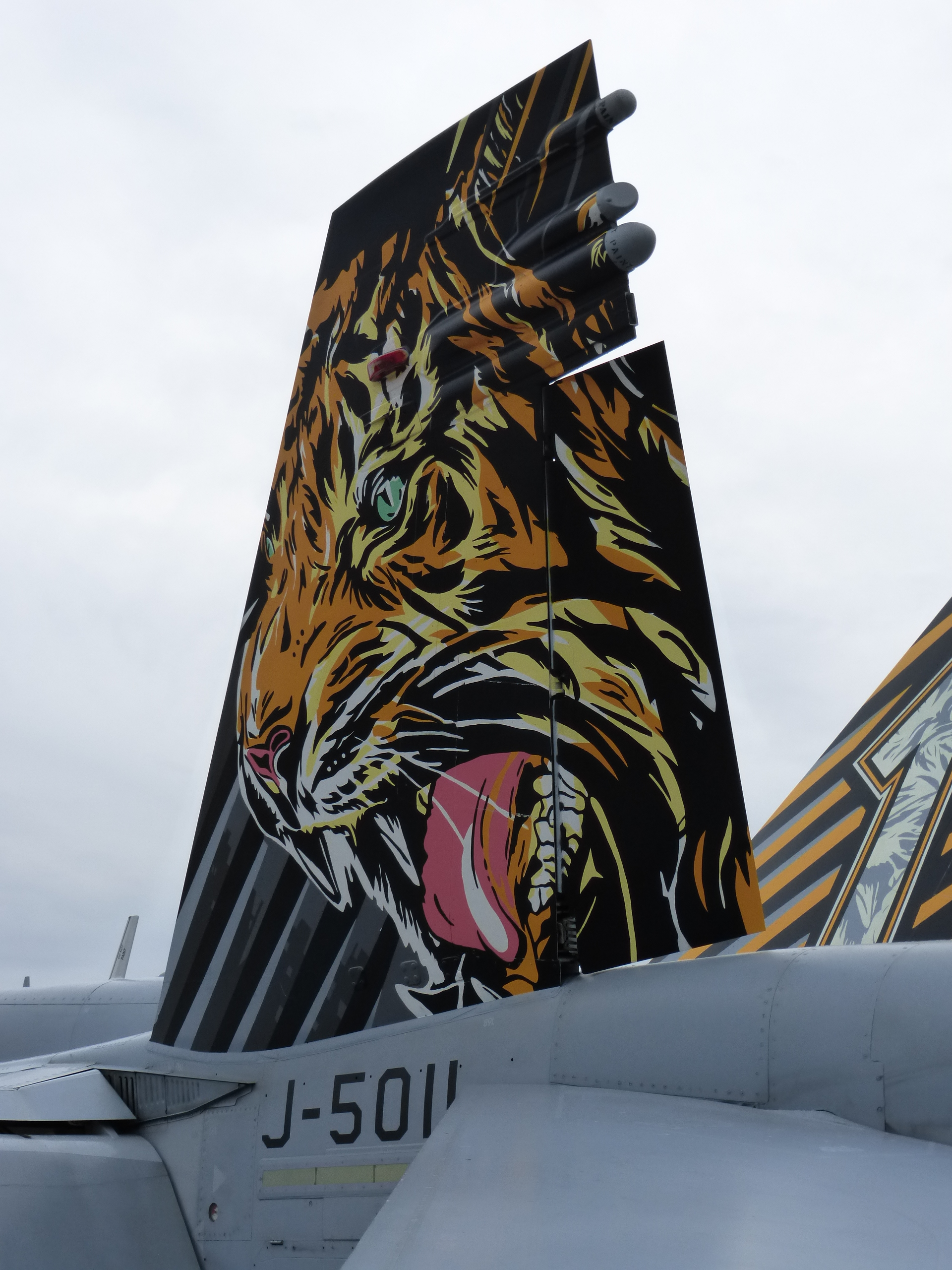 Seitenleitwerk der F-18 der Schweizer Luftwaffe J-5011 mit Tigerlackierung am Tag der Bundeswehr 2016 in Neuburg an der Donau (Deutschland)